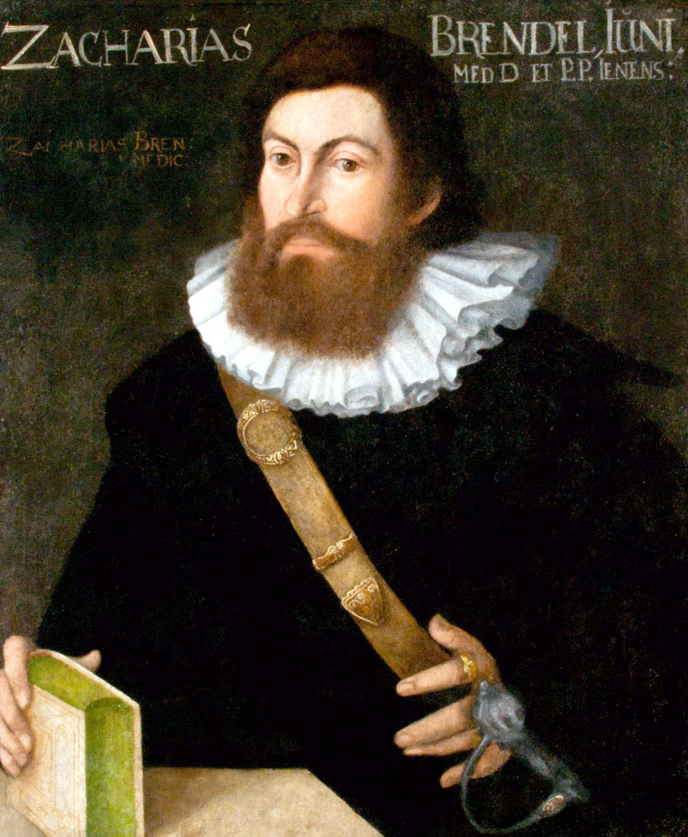 Zacharias Brendel der Jüngere (1592-1638) deutscher Mediziner, Botaniker und Chemiker